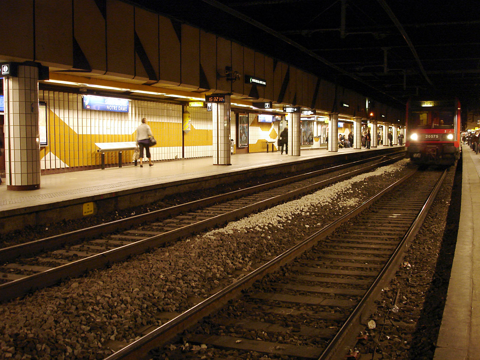 Gare Saint-Michel - Notre-Dame du RER C, Paris, France. Vue en direction d'Invalides.